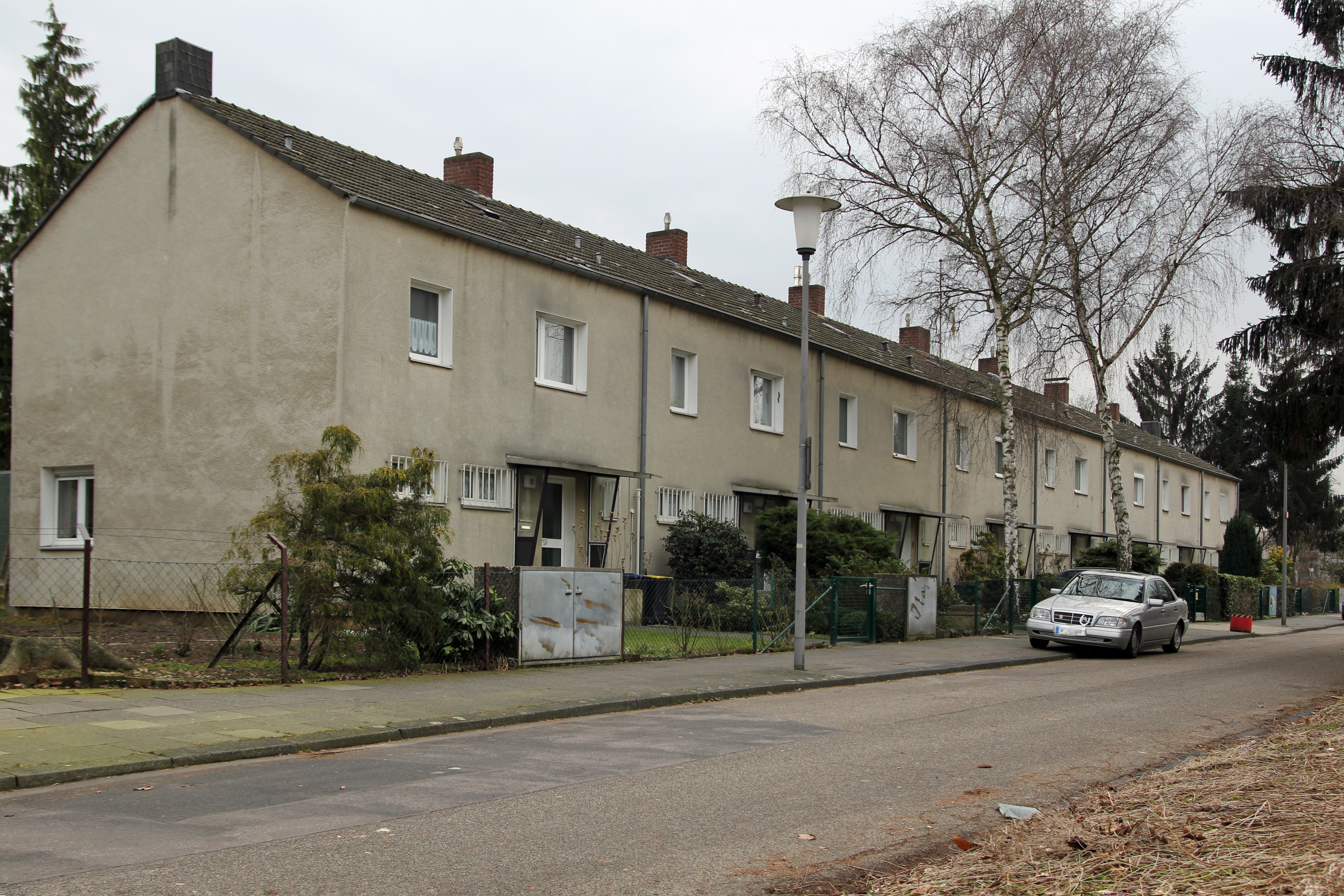 ehemals belgische Siedlung Köln-Neuehrenfeld, Glückstadter Straße